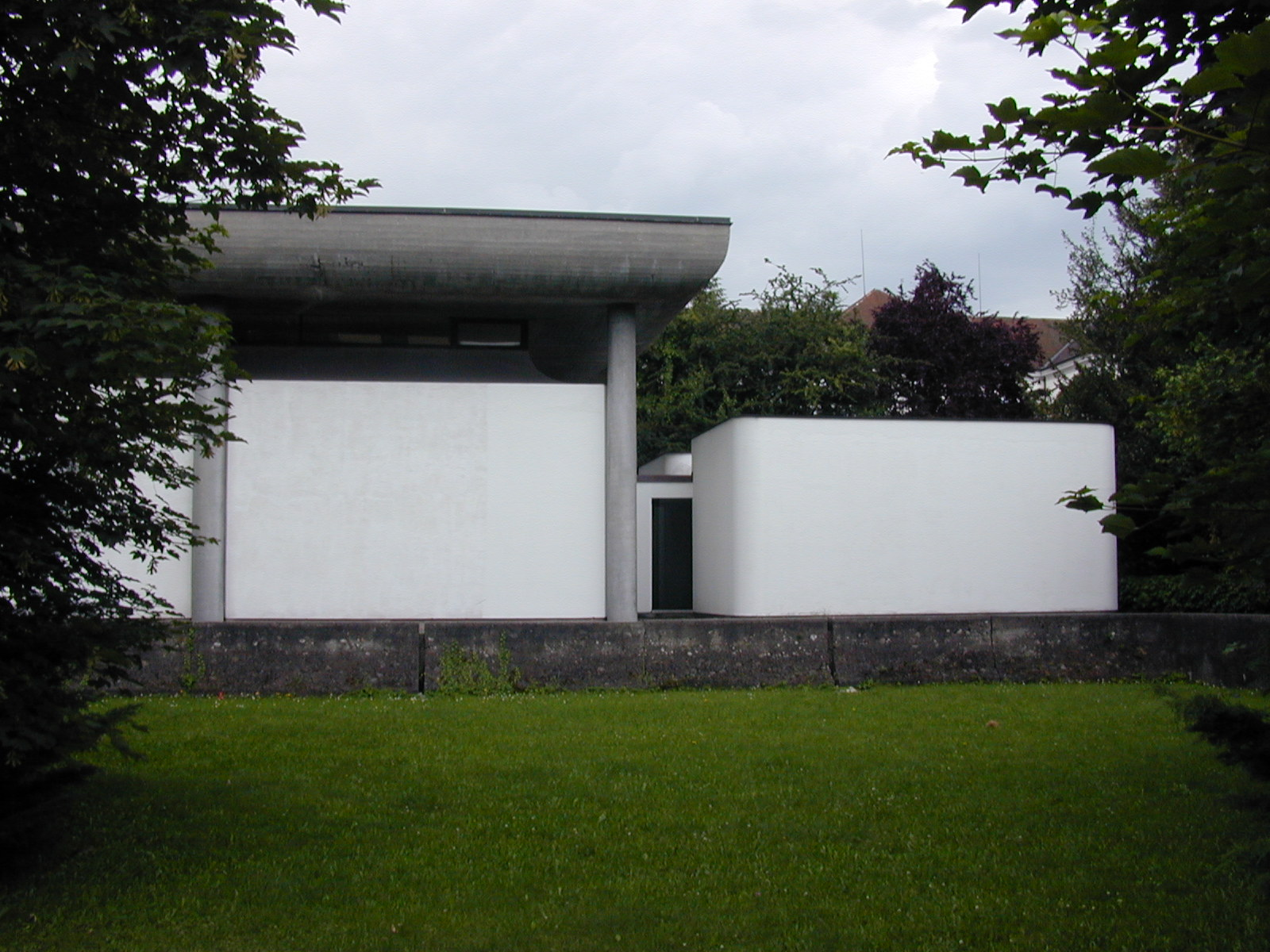 Synagoge